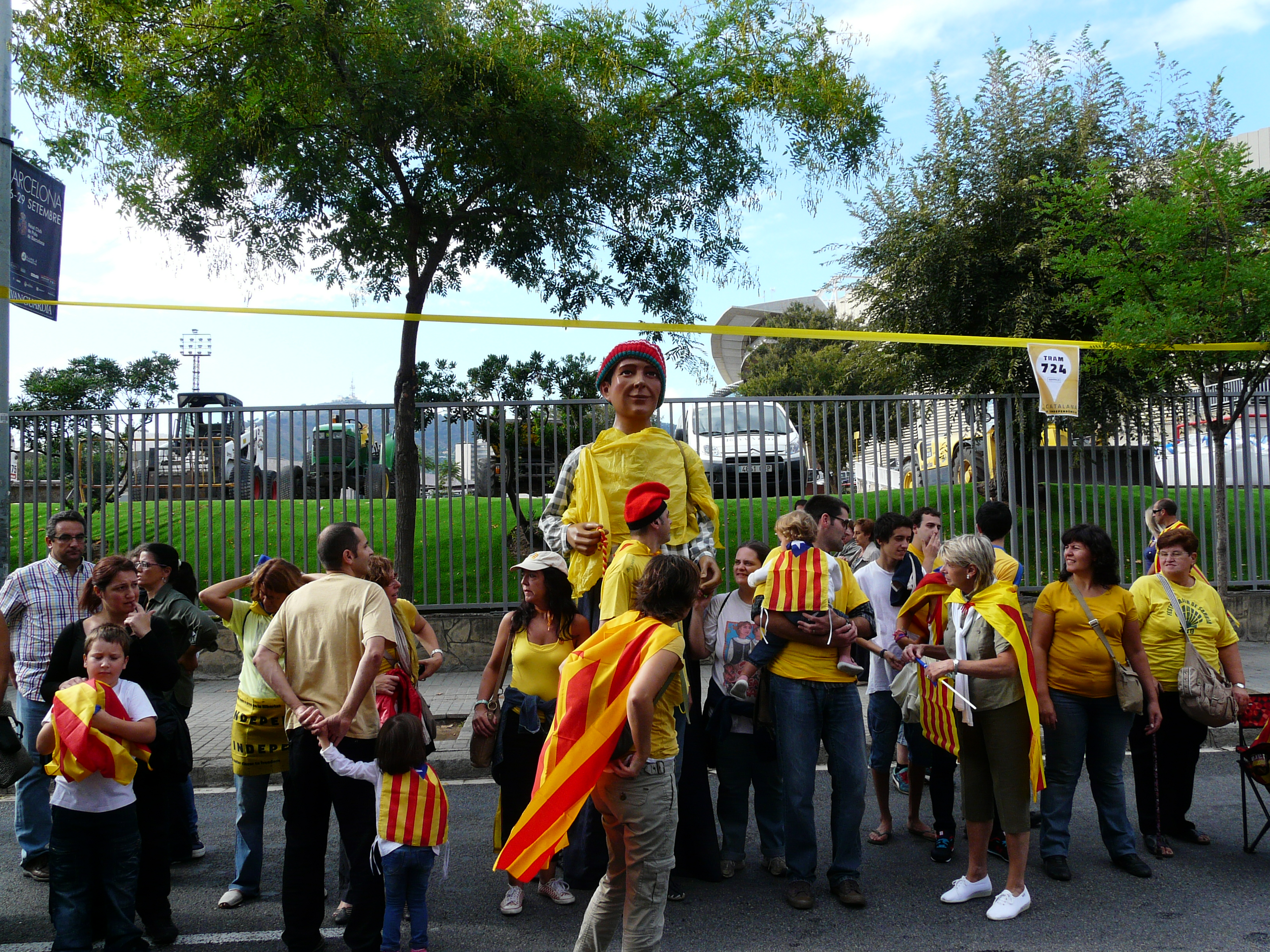 Via Catalana per la Independència. Abans, durant i després de la Via, a Barcelona i el Baix Llobregat.